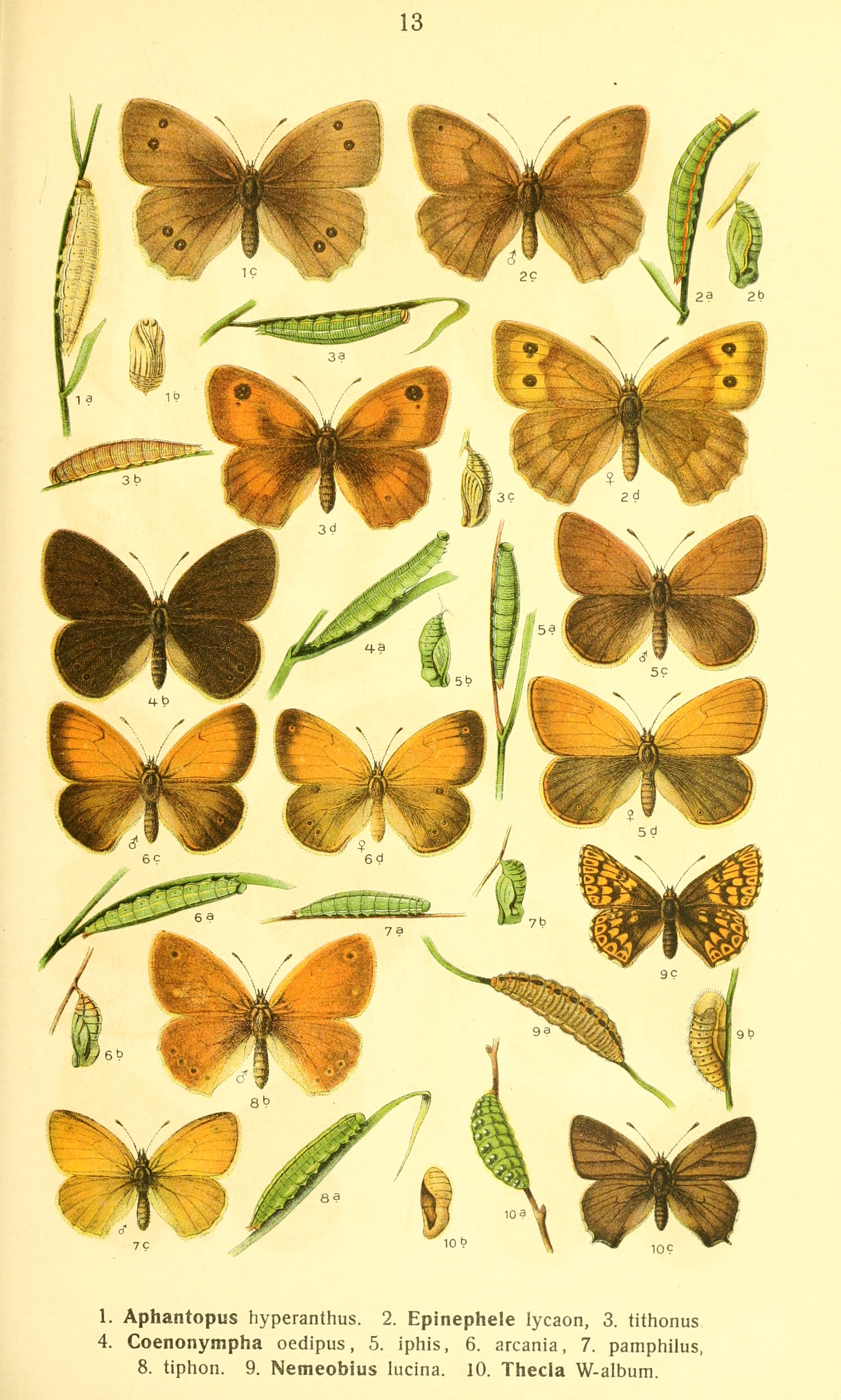 Plate from Die Schmetterlinge Deutschlands mit besonderer Berücksichtigung ihrer Biologie, Bd. 1-4, by K. Eckstein